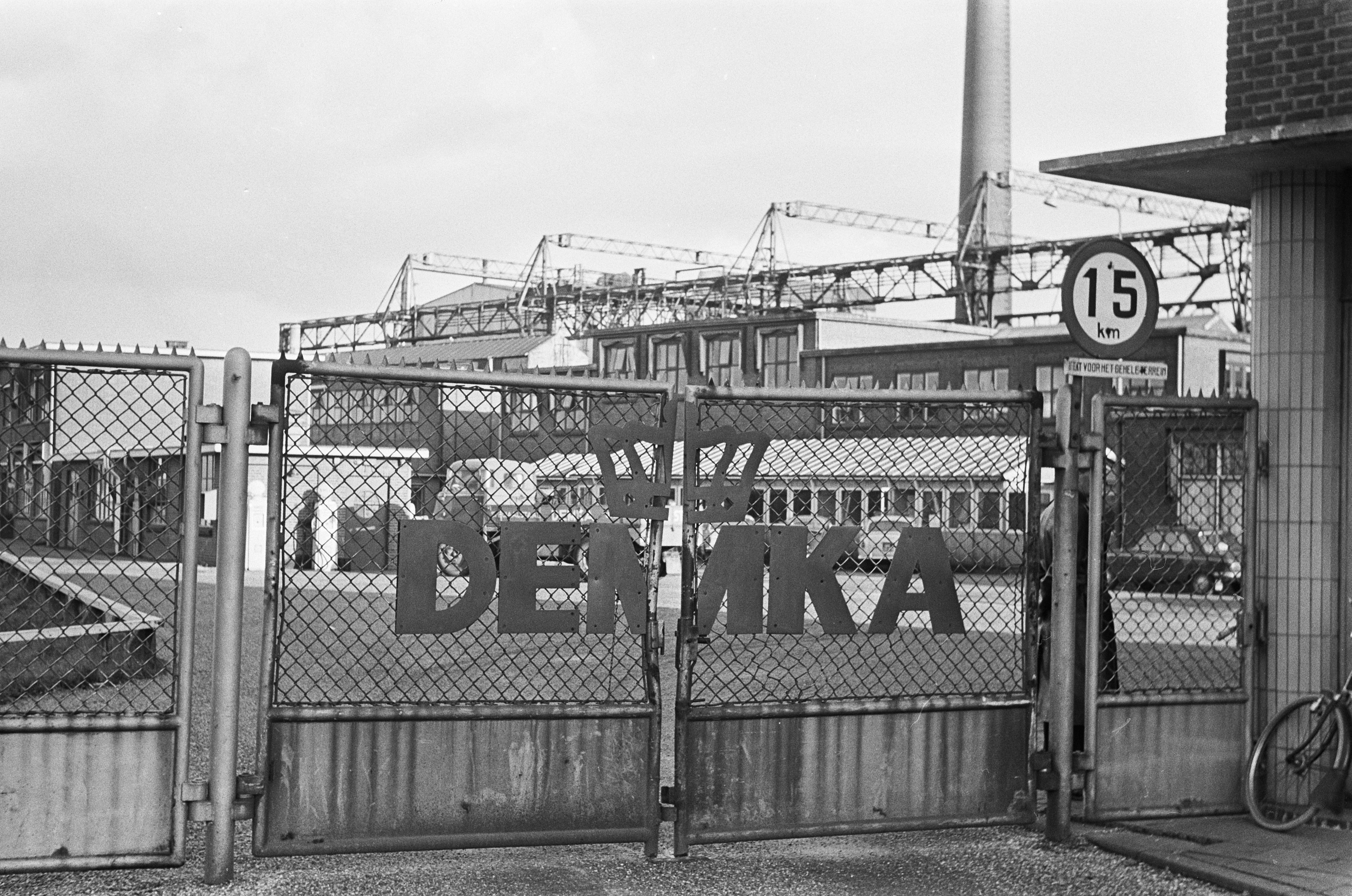 Collectie / Archief : Fotocollectie Anefo Reportage / Serie : Ontslagen bij DEMKA, Utrecht Beschrijving : De ingang van de DEMKA vestiging te Utrecht Datum : 10 november 1966 Locatie : Utrecht (provincie), Utrecht (stad) Trefwoorden : bedrijventerreinen, ontslagen Fotograaf : Fotograaf Onbekend / Anefo, Evers, Joost / Anefo Auteursrechthebbende : Nationaal Archief Materiaalsoort : Negatief (zwart/wit) Nummer archiefinventaris : bekijk toegang 2.24.01.05 Bestanddeelnummer : 919-7748